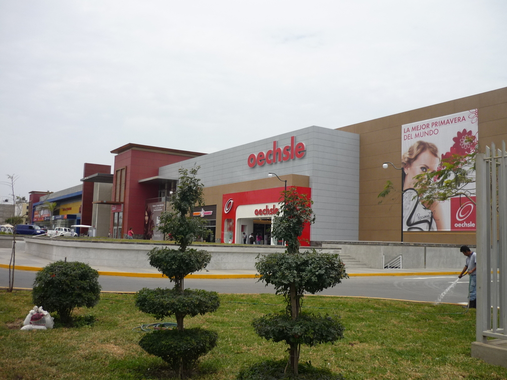 TIENDA OECHSLE EN TRUJILLO REAL PLAZA